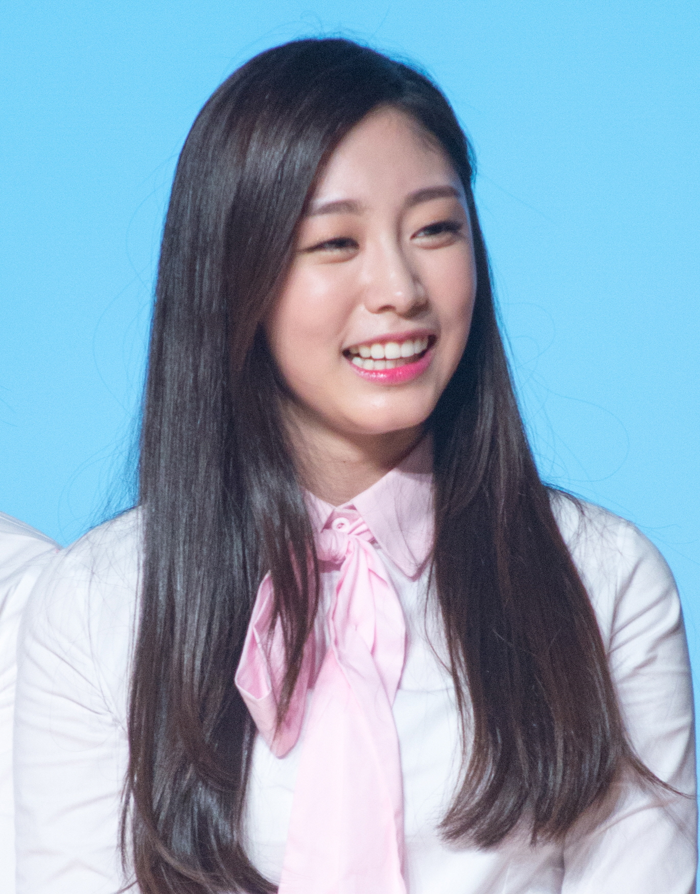 160625 서든콘서트 재보정-서지수